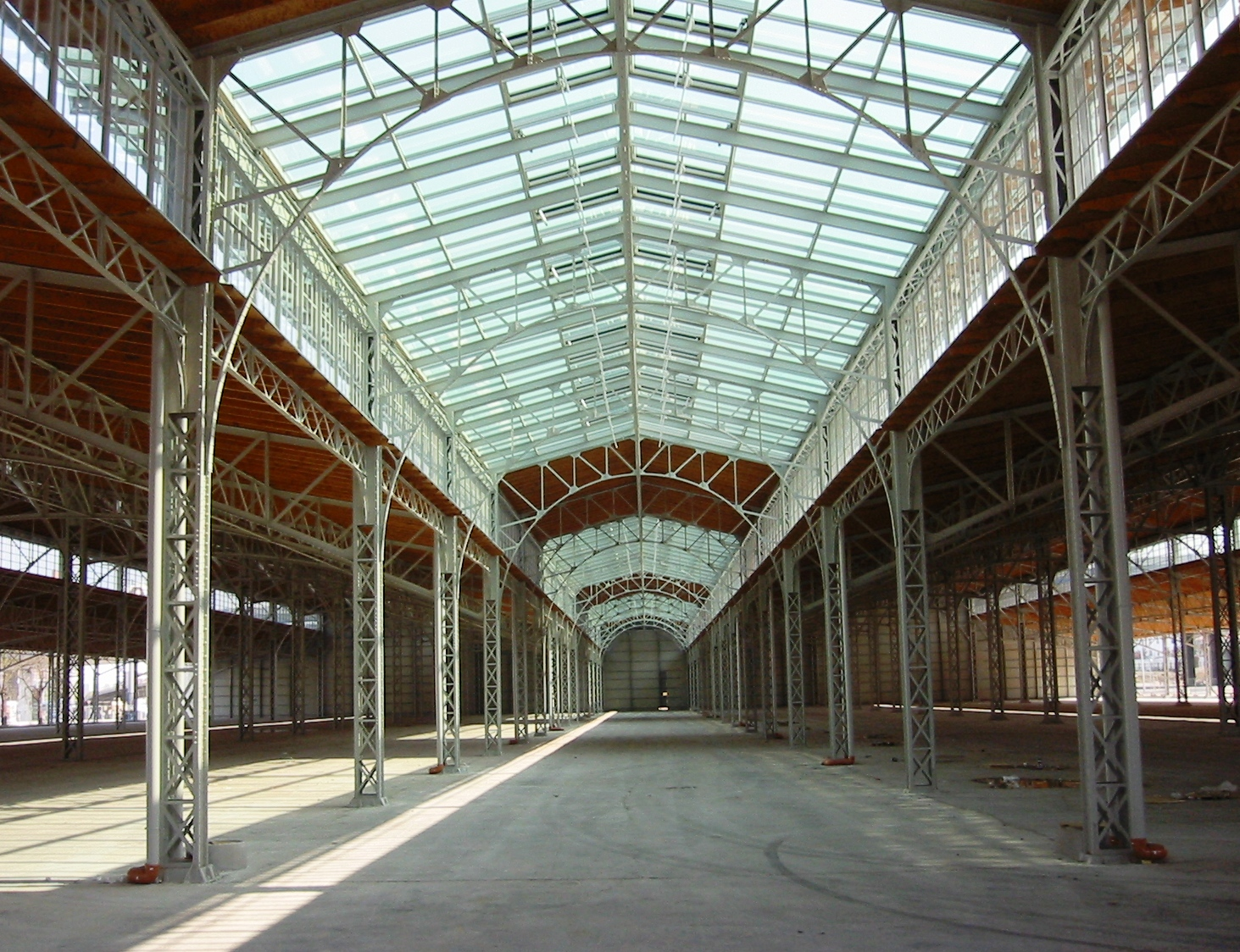 Wien Sankt Marx Rinderhalle Innenansicht